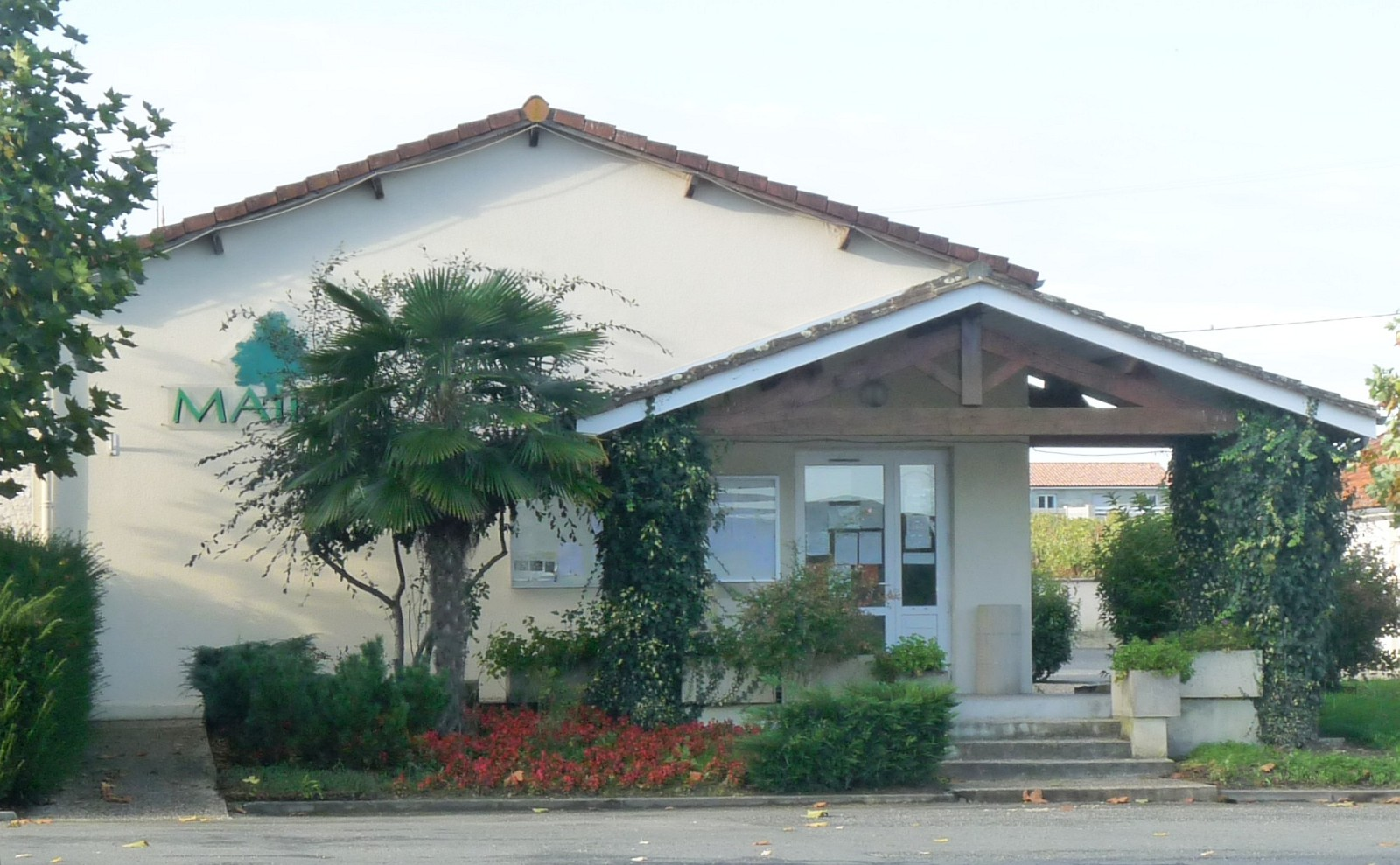 Mairie de Mérignac, Charente-Maritime, France